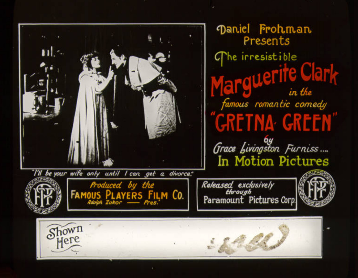 Gretna Green lantern slide